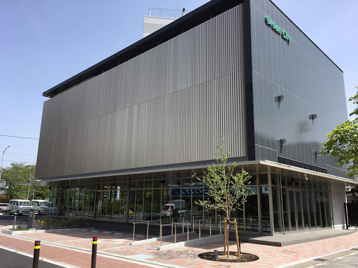 グリーンシティケーブルテレビ 現社屋（2020年4月時点） 「グリーンシティビル」